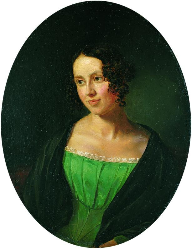 Depicted person: Regine Olsen